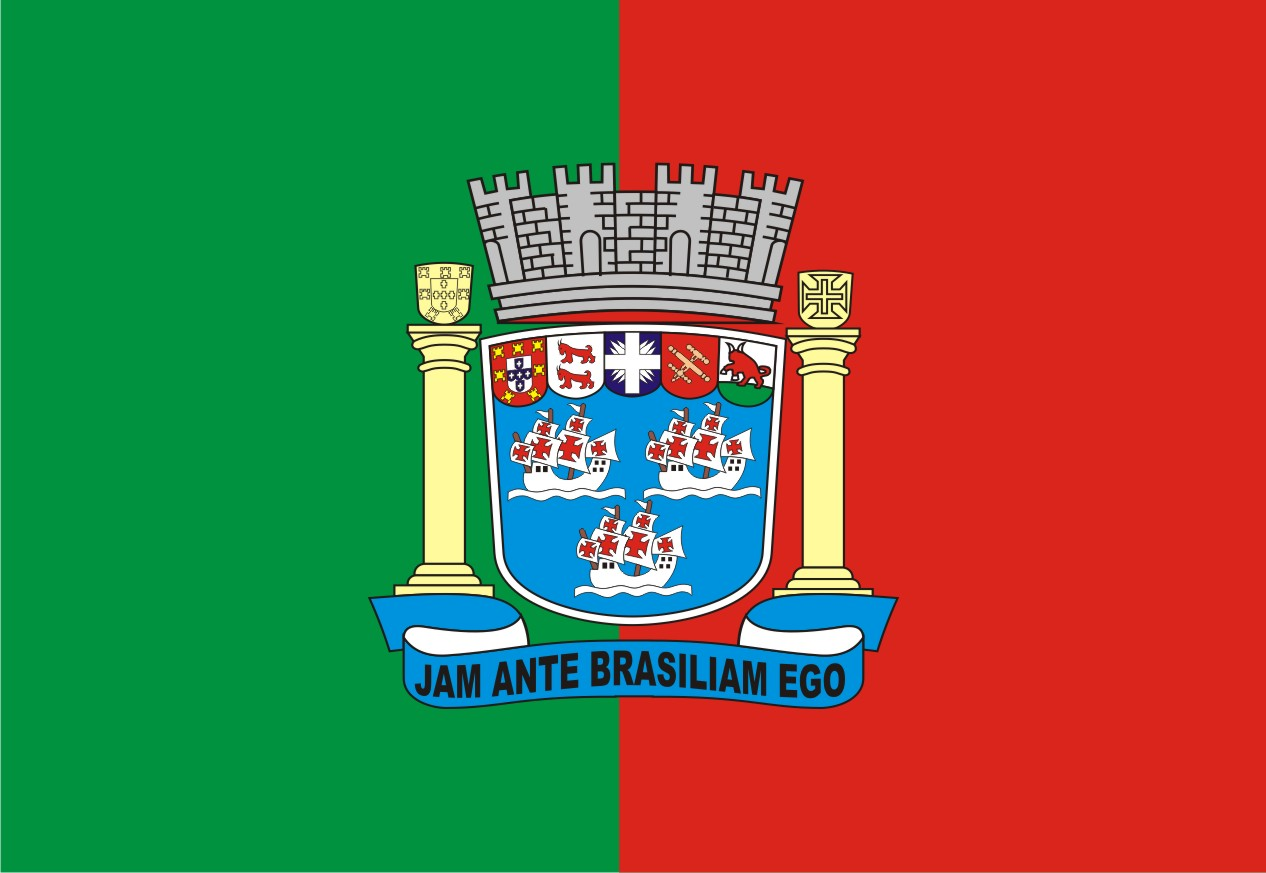 Bandeira Oficial da Cidade de Porto Seguro